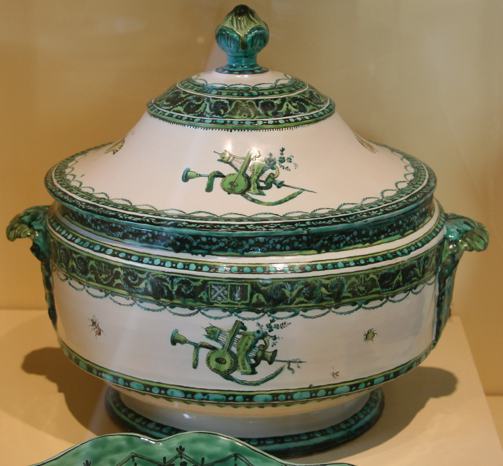 Musée de la faïence. Pot à oille et son couvercle, faïence stannifère, décor petit feu polychrome jaune, vert, brun et noir. Atelier de Gaspard Robert, 1780/1790. Pot circulaire à panse cylindrique, décor aux trophées de musique, animés de papillons et insectes.